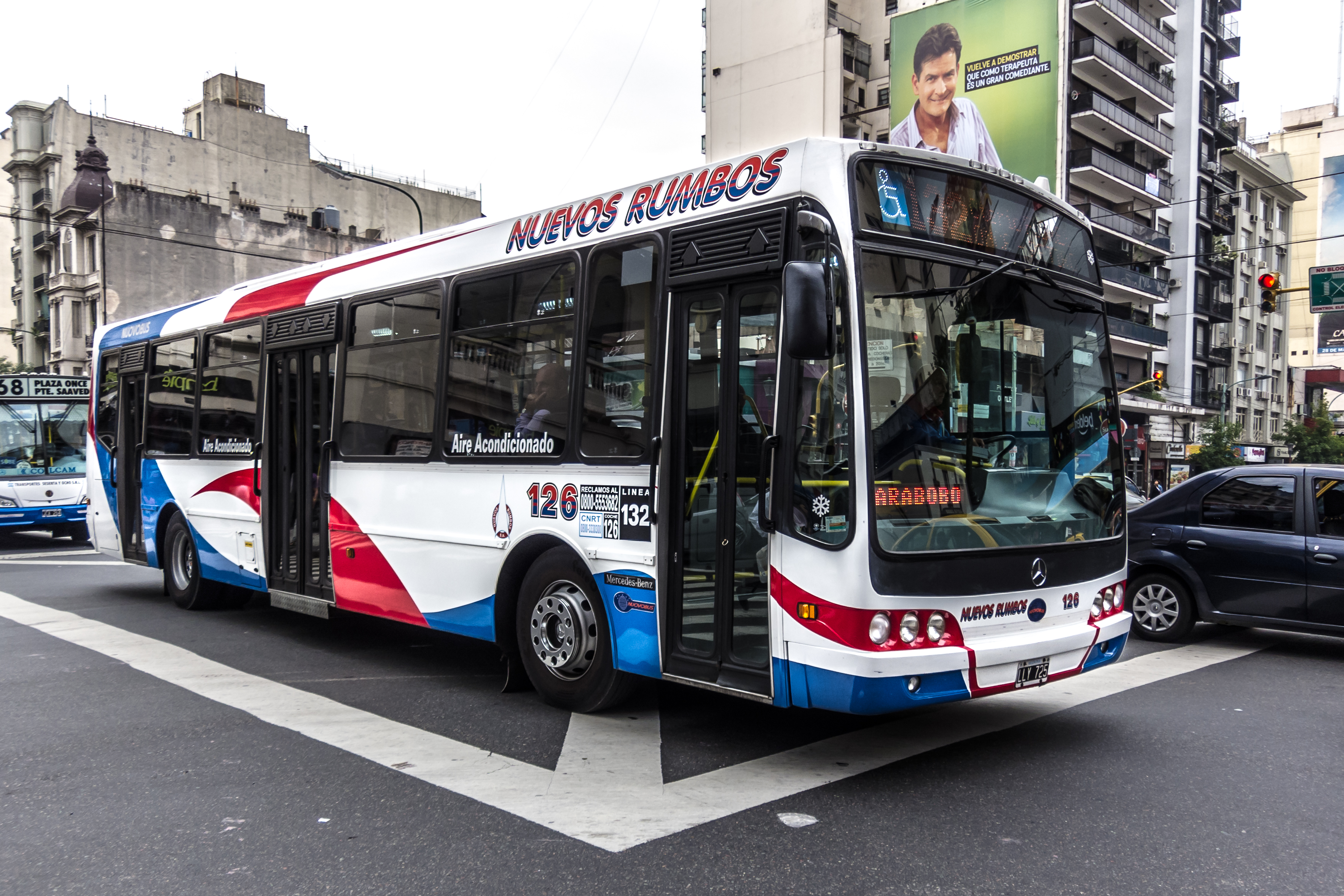 Colectivo de la Línea 132, interno 126, carrocería Nuovobus, chasis Mercedez-Benz OH 1718L-SB, matrícula LLY725. Buenos Aires, Argentina.